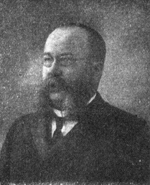 Österreichischer Politiker, Reichsratswahl 1907, Name siehe Dateiname